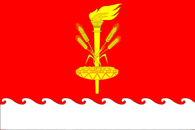 Флаг села Новоукраинское (Гулькевичский район Краснодарского края)